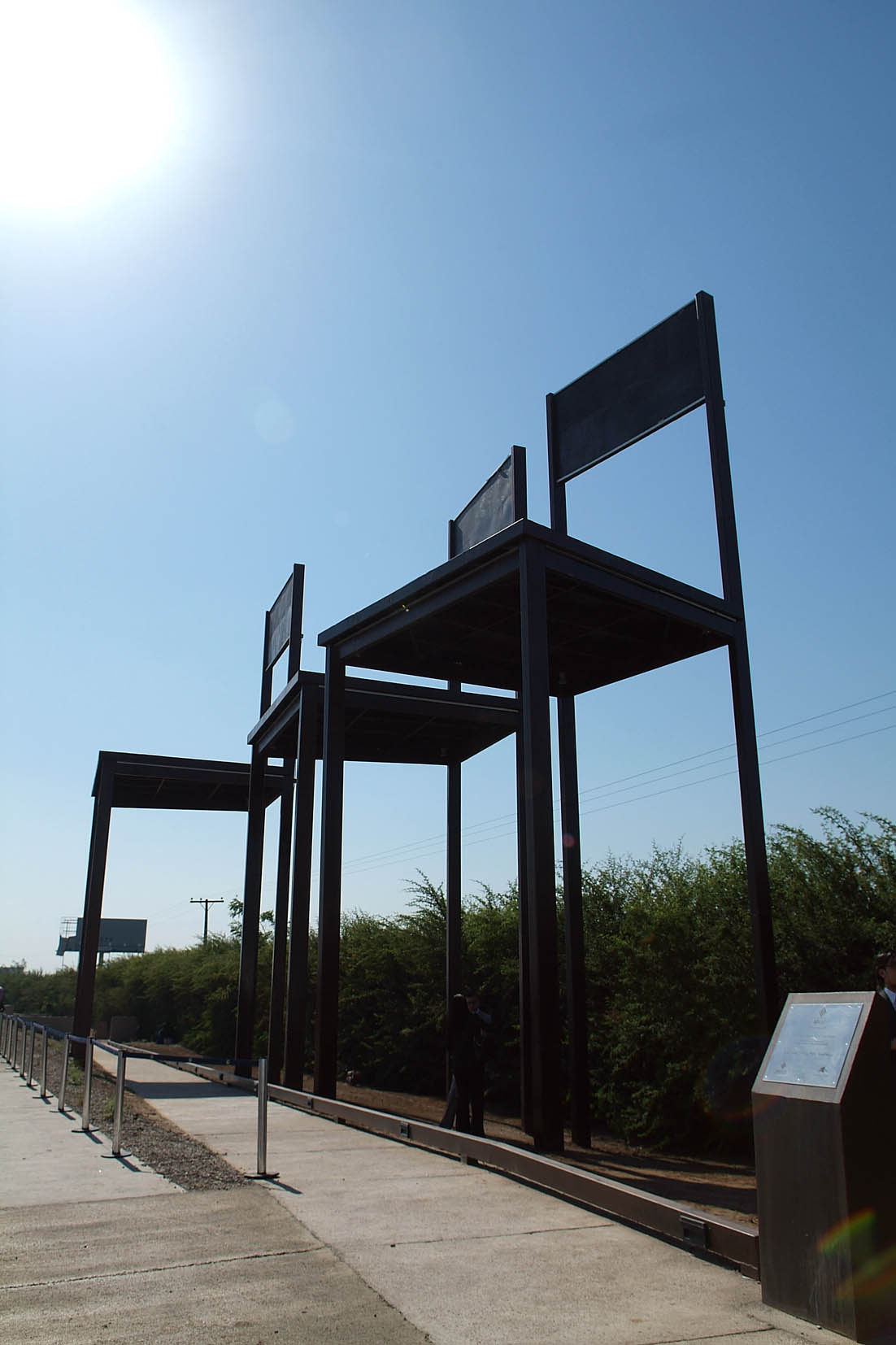 Inauguración del monumento "Un lugar para la memoria", construido en recuerdo de Santiago Nattino, Manuel Guerrero y José Manuel Parada.